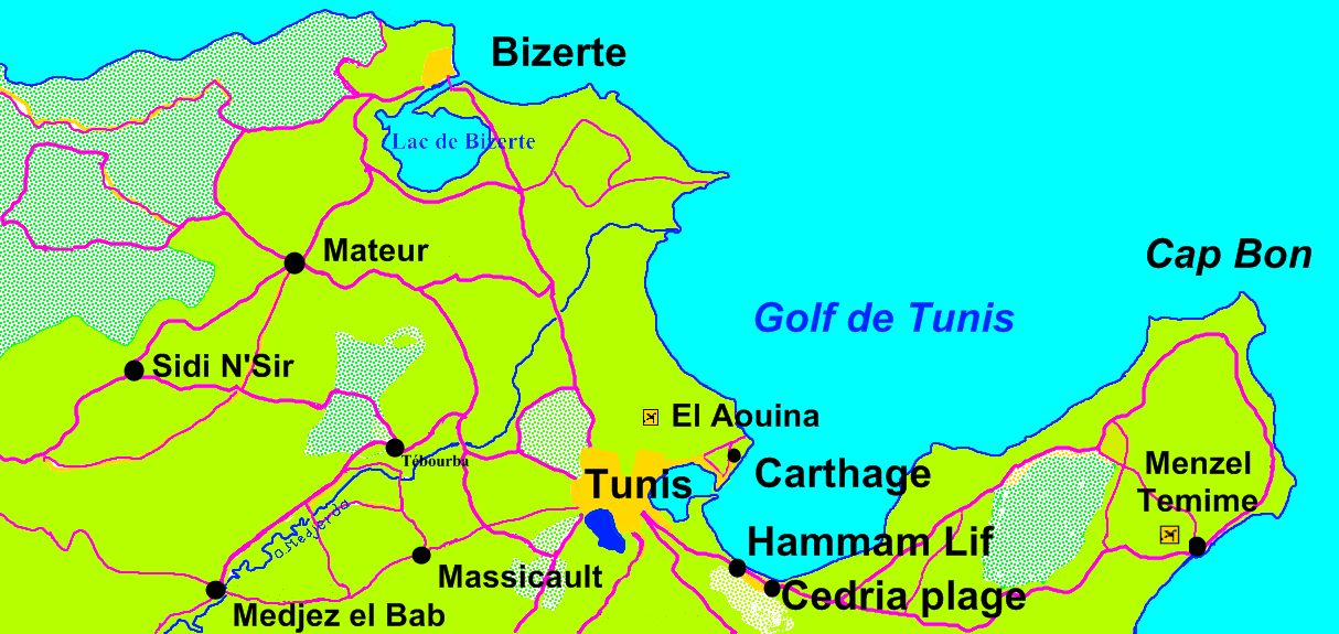 Carte des principales villes citées dans l'article sur la Phalange africaine.